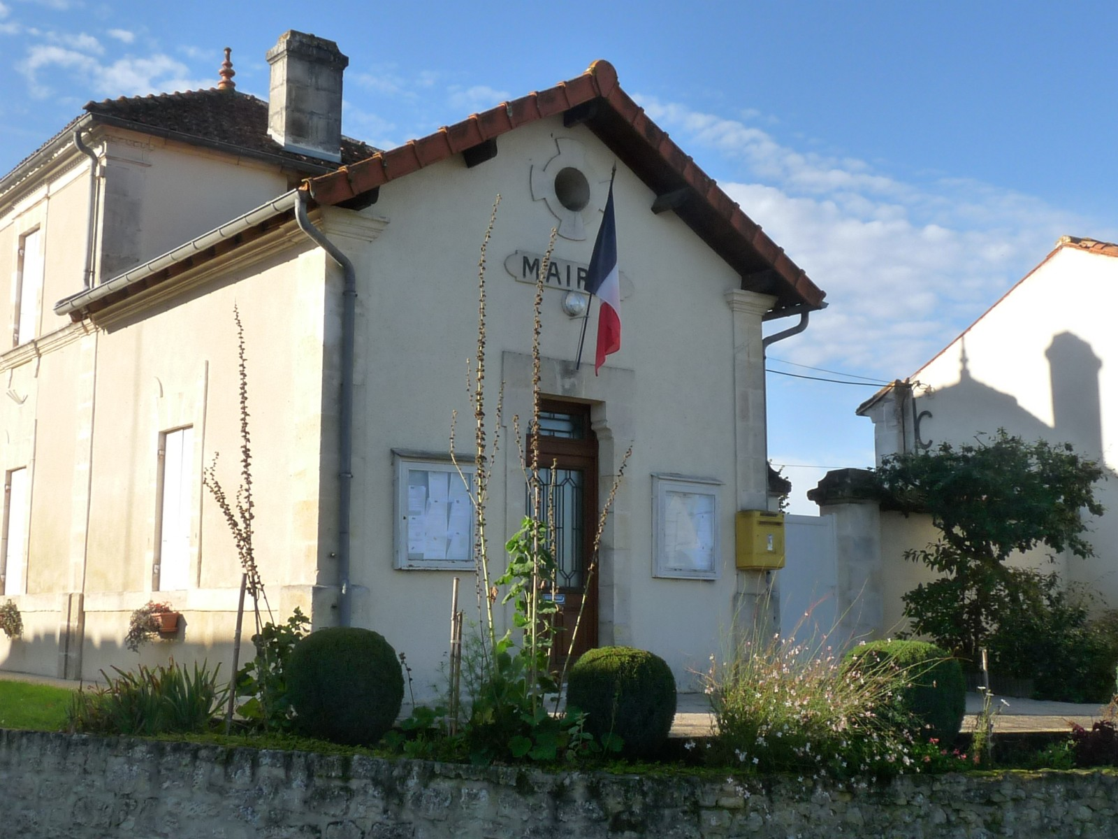 Mairie de Vanzac, Charente-Maritime, France